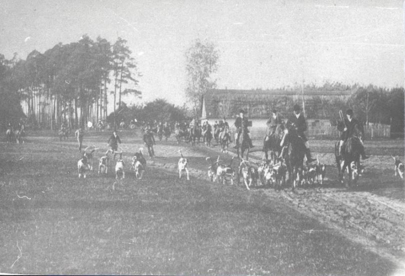 Staré město u Karviné - Larischova honitba